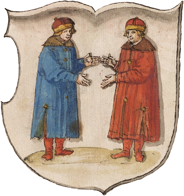 Герб воеводства Великого княжества Литовского. По мнению А. Шаланды, герб Подляшского воеводства.